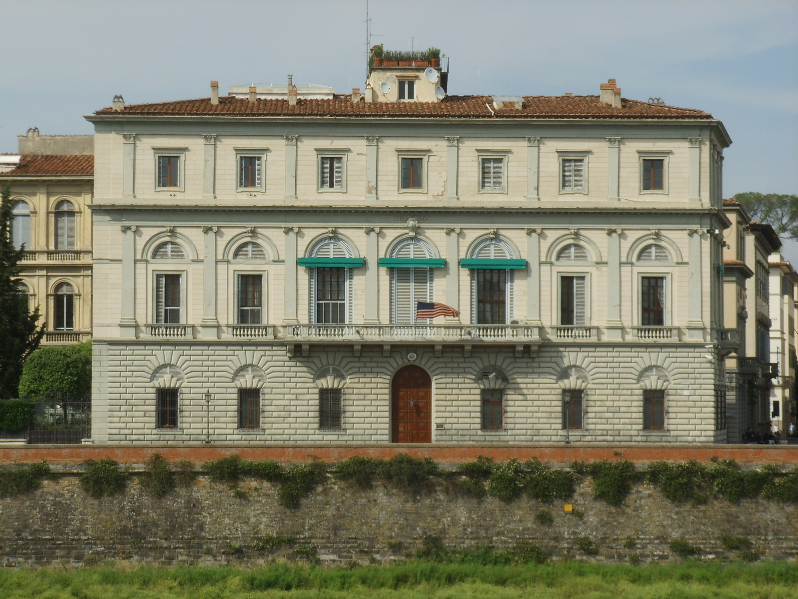 Palazzo calcagnini dal lungarno